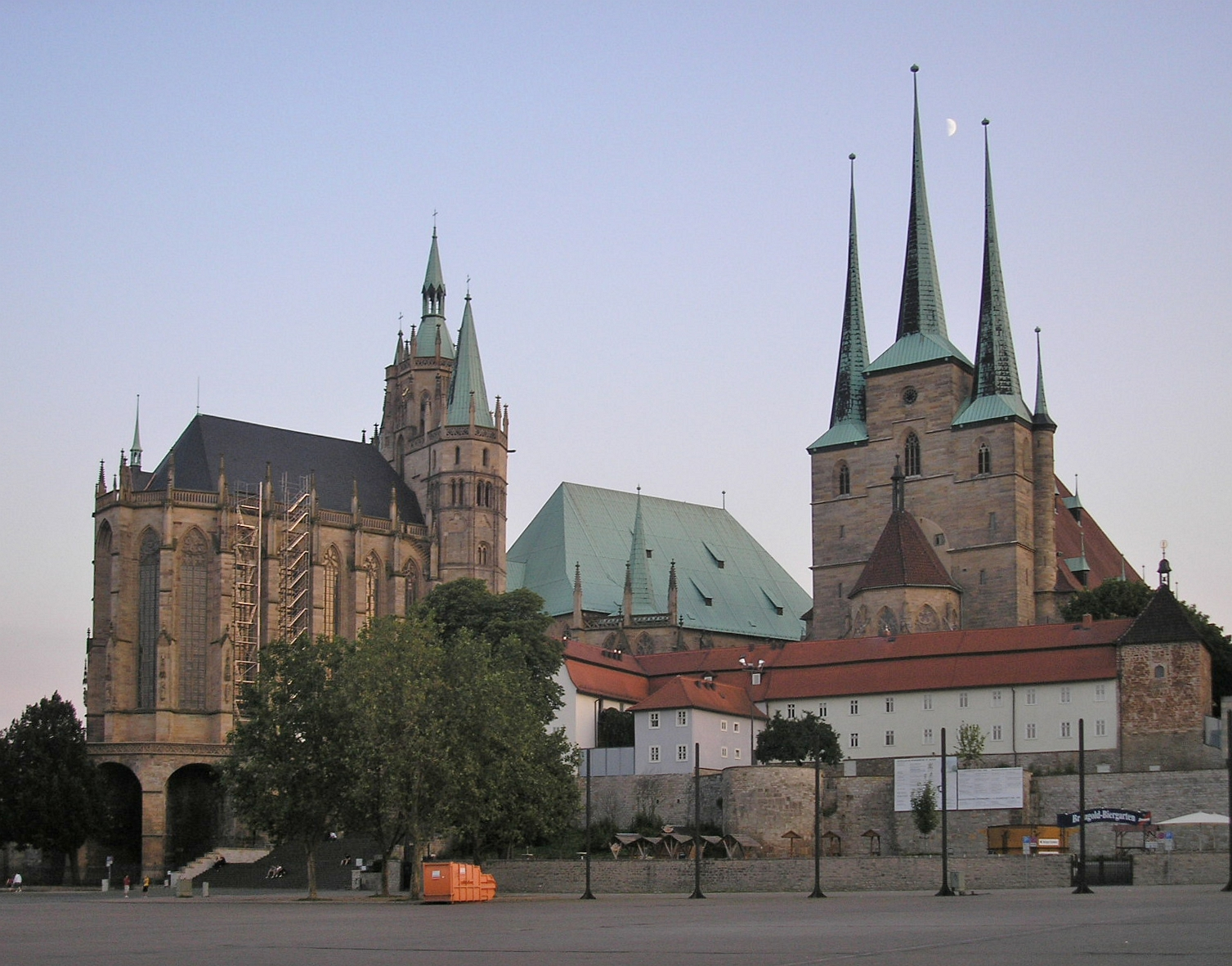 Blick auf den Dom und die Severikirche in Erfurt am Abend.